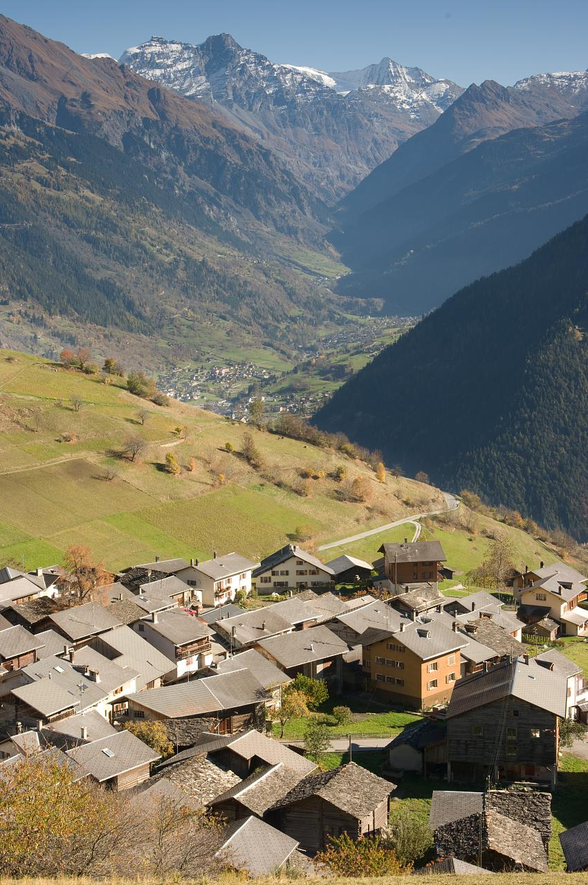 Village de Levron dans la commune de Vollèges, et vue sur le Val de Bagnes